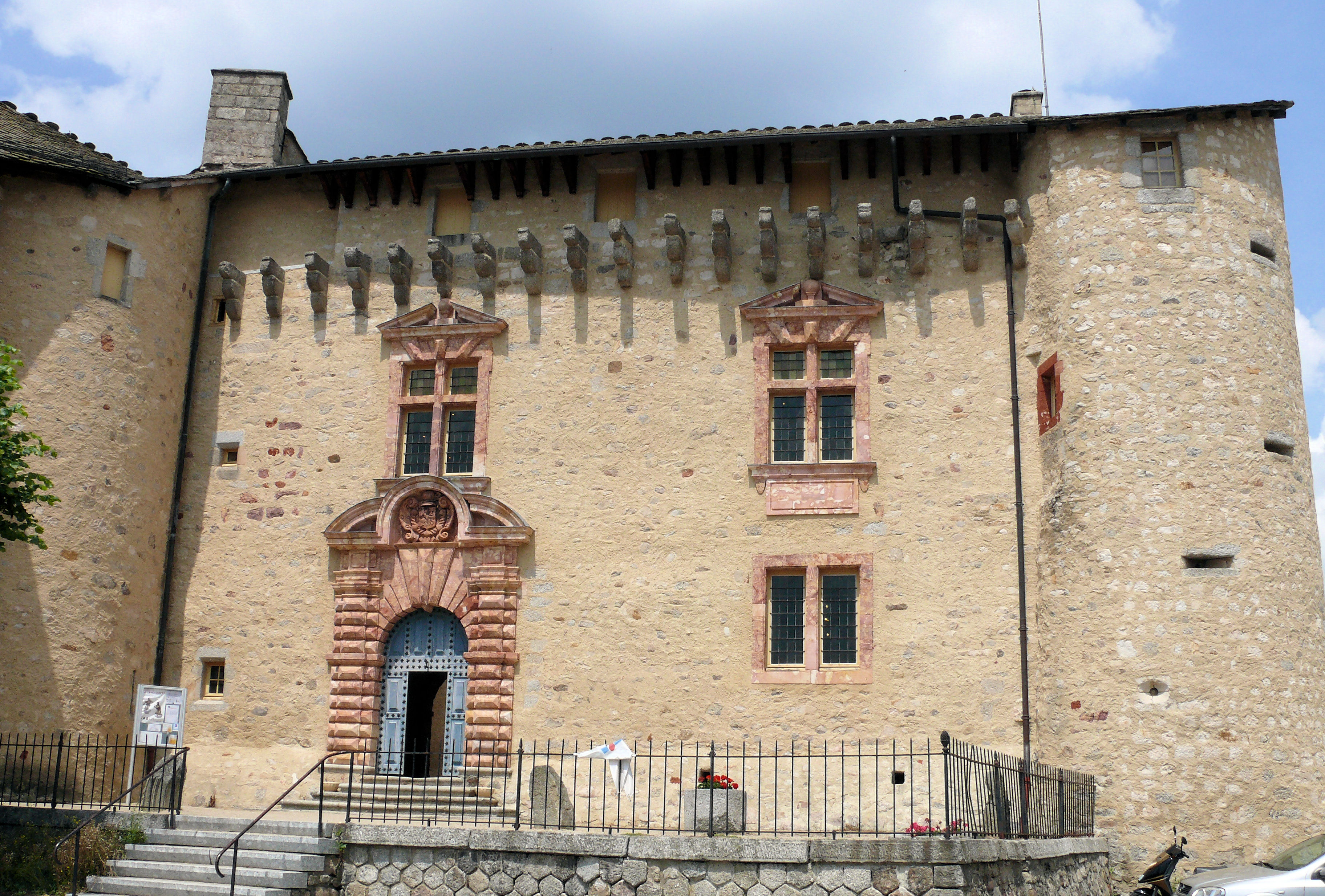 Saint-Alban-sur-Limagnole - Château - Façade sud